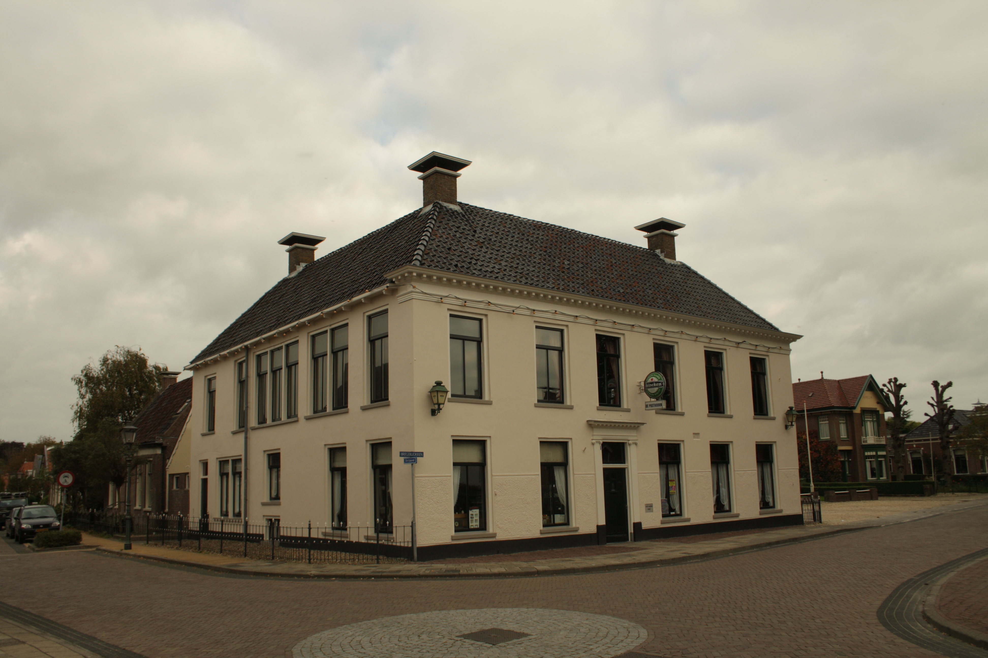 De Posthoorn, Brêgebuorren 10 te Dronrijp.